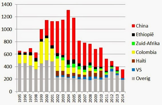 Aantallen interlandelijke adopties naar Nederland tussen 1995 en 2014. Bron: Stichting Adoptievoorzieningen. NB: in de periode 1996-2001 vallen Haïti en de VS onder 'Overig'. In 2014 vallen alle landen behalve China en de VS onder 'Overig'.